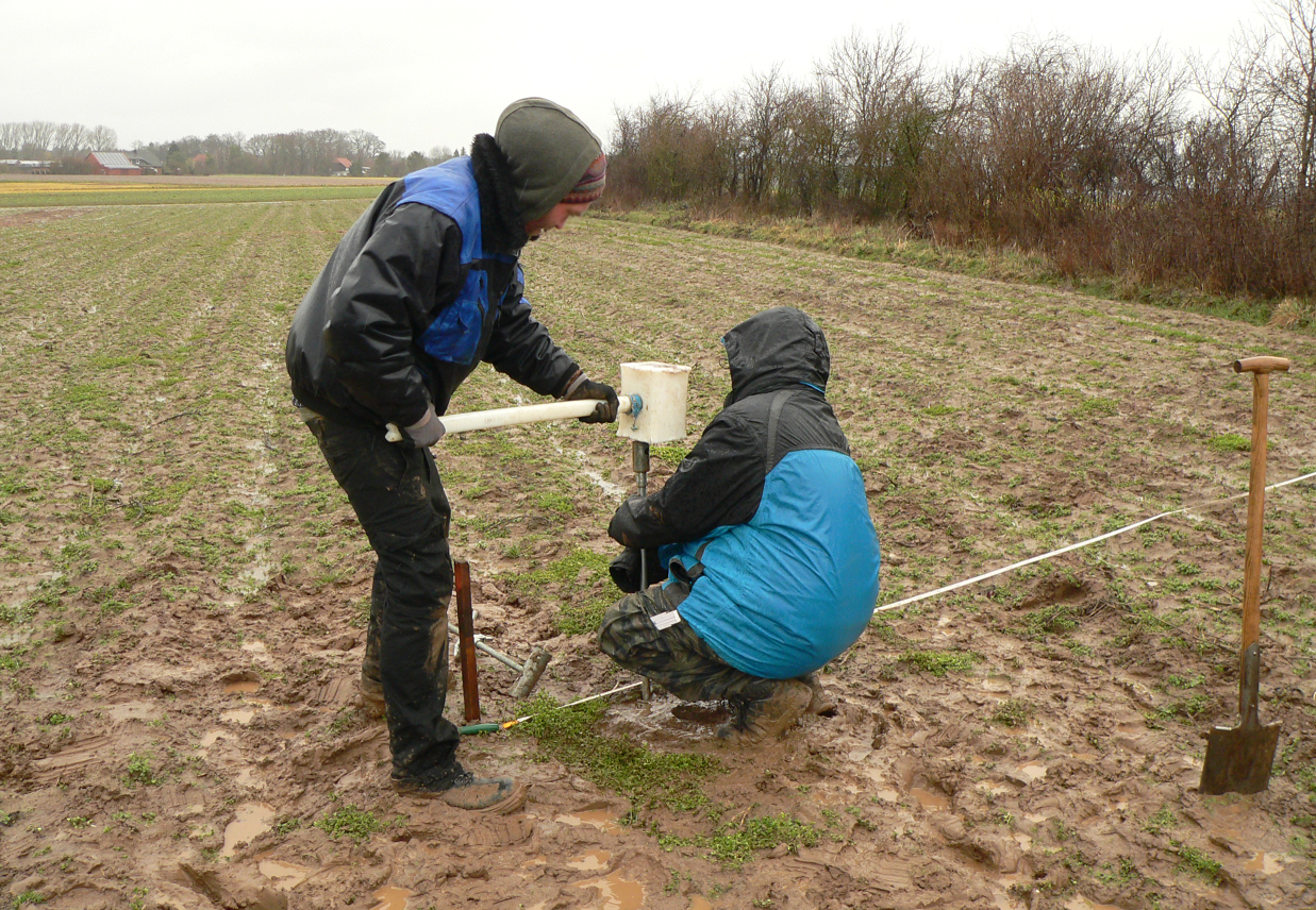 Erdwerk von Wellie